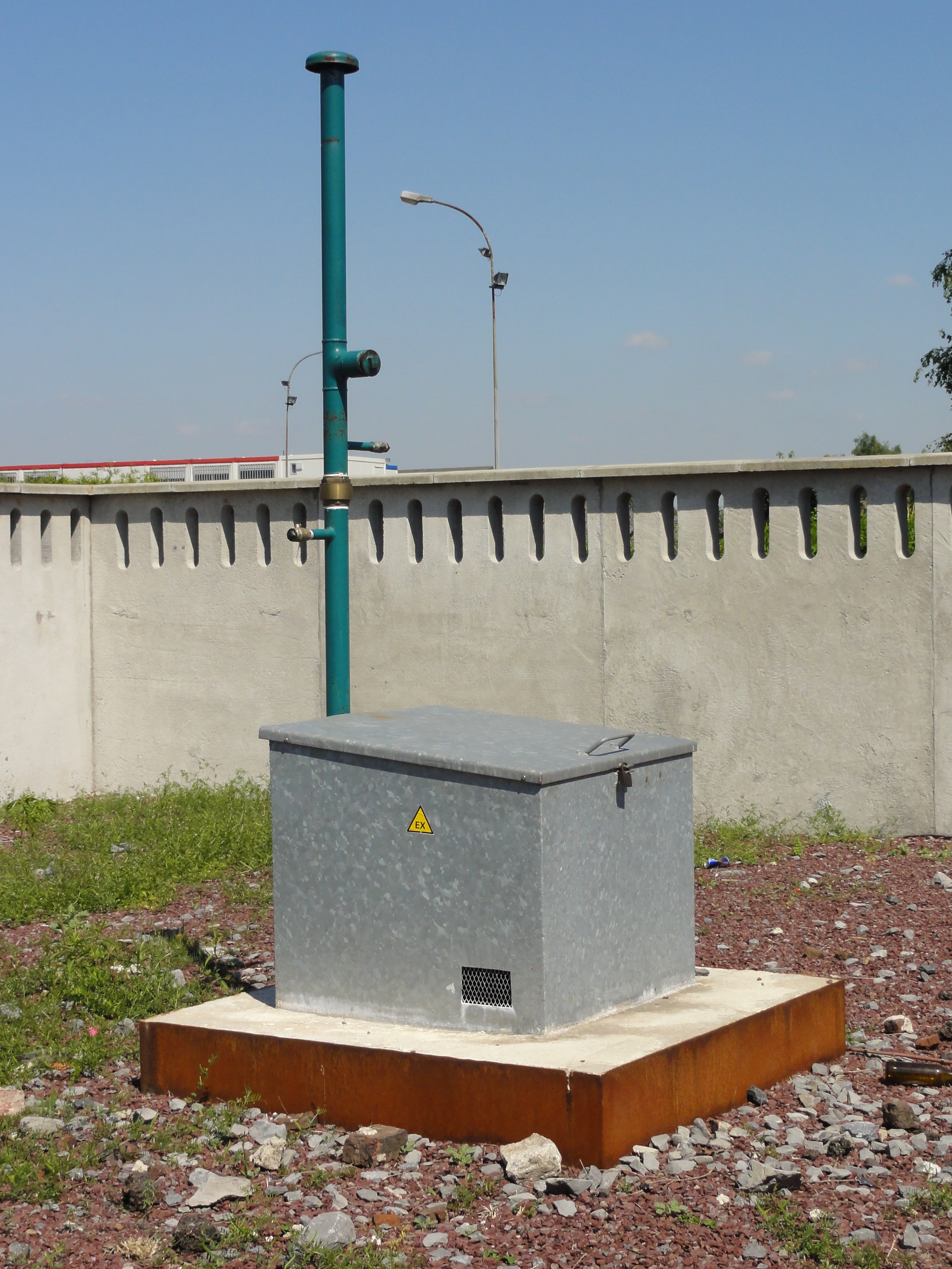 La Fosse Balive de la Compagnie des mines d'Anzin était un charbonnage constitué d'un seul puits situé à Vieux-Condé, Nord, Nord-Pas-de-Calais, France.